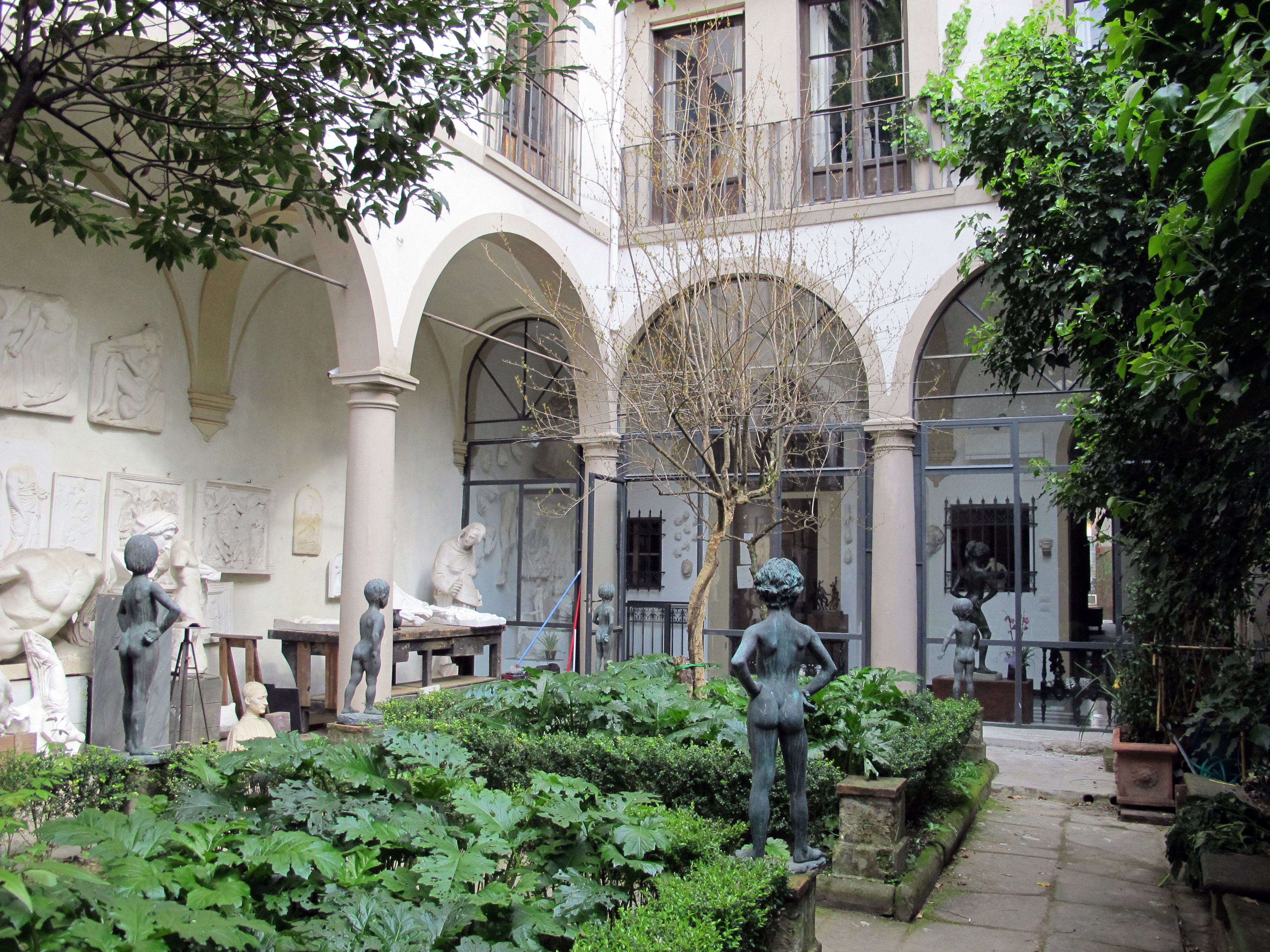 Casa Merciai - Firenze